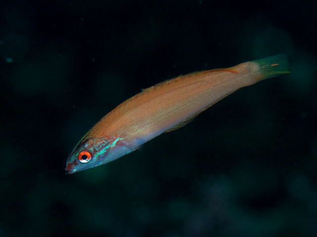 ヤマシロベラ Pseudocoris yamashiroi